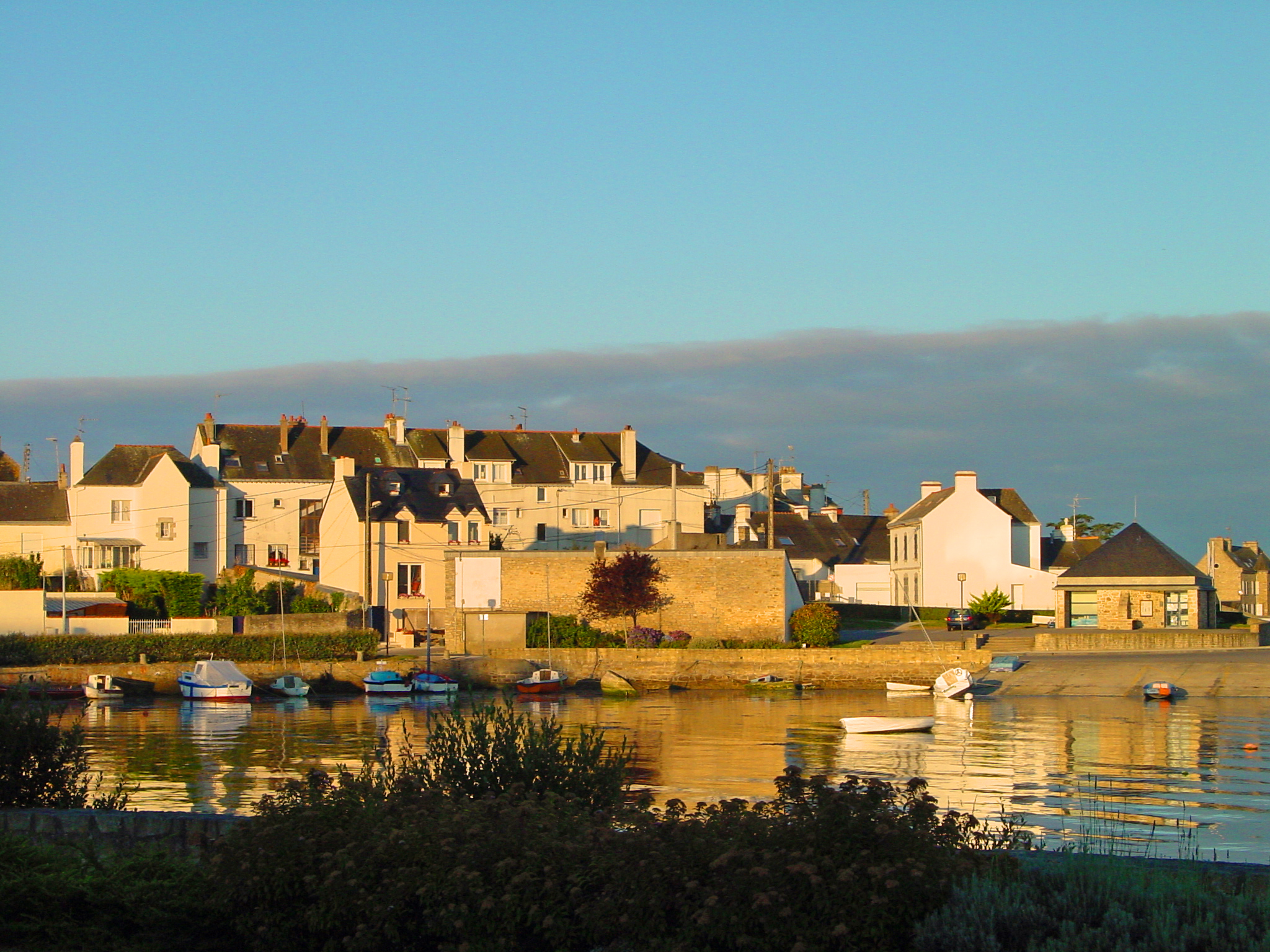 Sunset over Locmiquelic in Britanny France